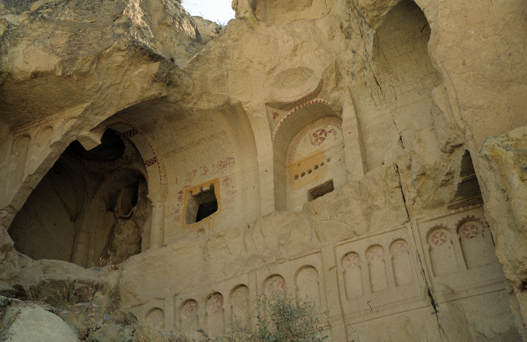 Karanlik Kilise in Göreme, Kappadokien, Zentraltürkei